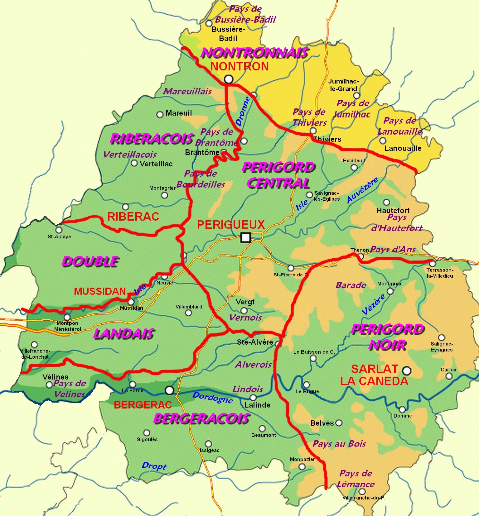 Localisation du Nontronnais sur la carte des pays traditionnels du Périgord.